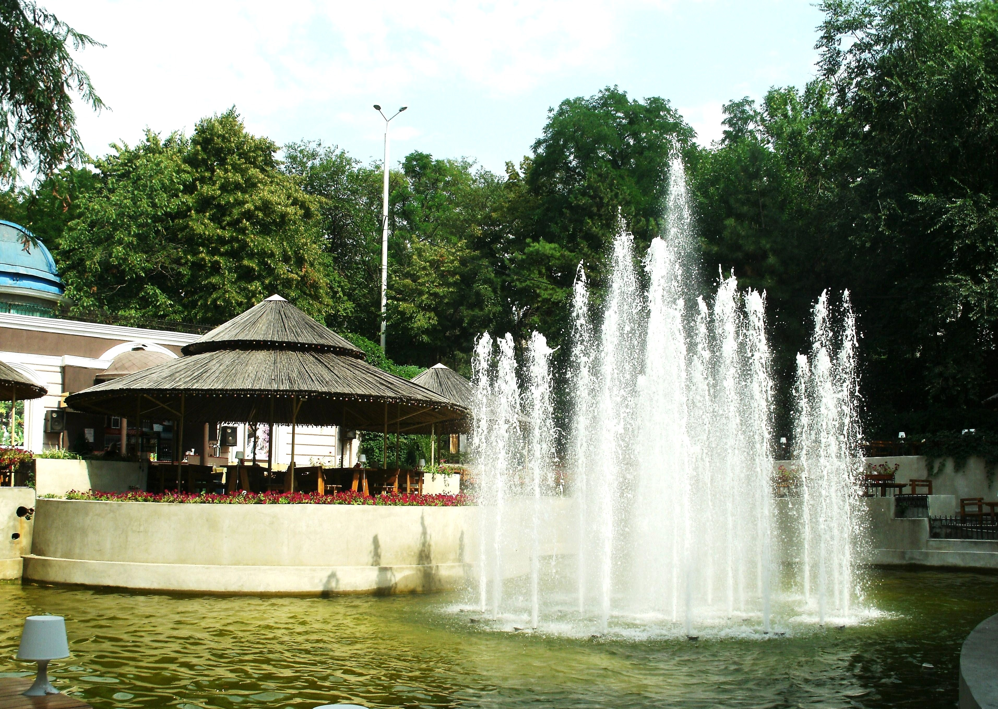 Центральный парк культуры и отдыха им. М. Горького